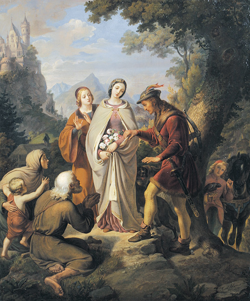 Das Rosenwunder der Hl. Elisabeth.